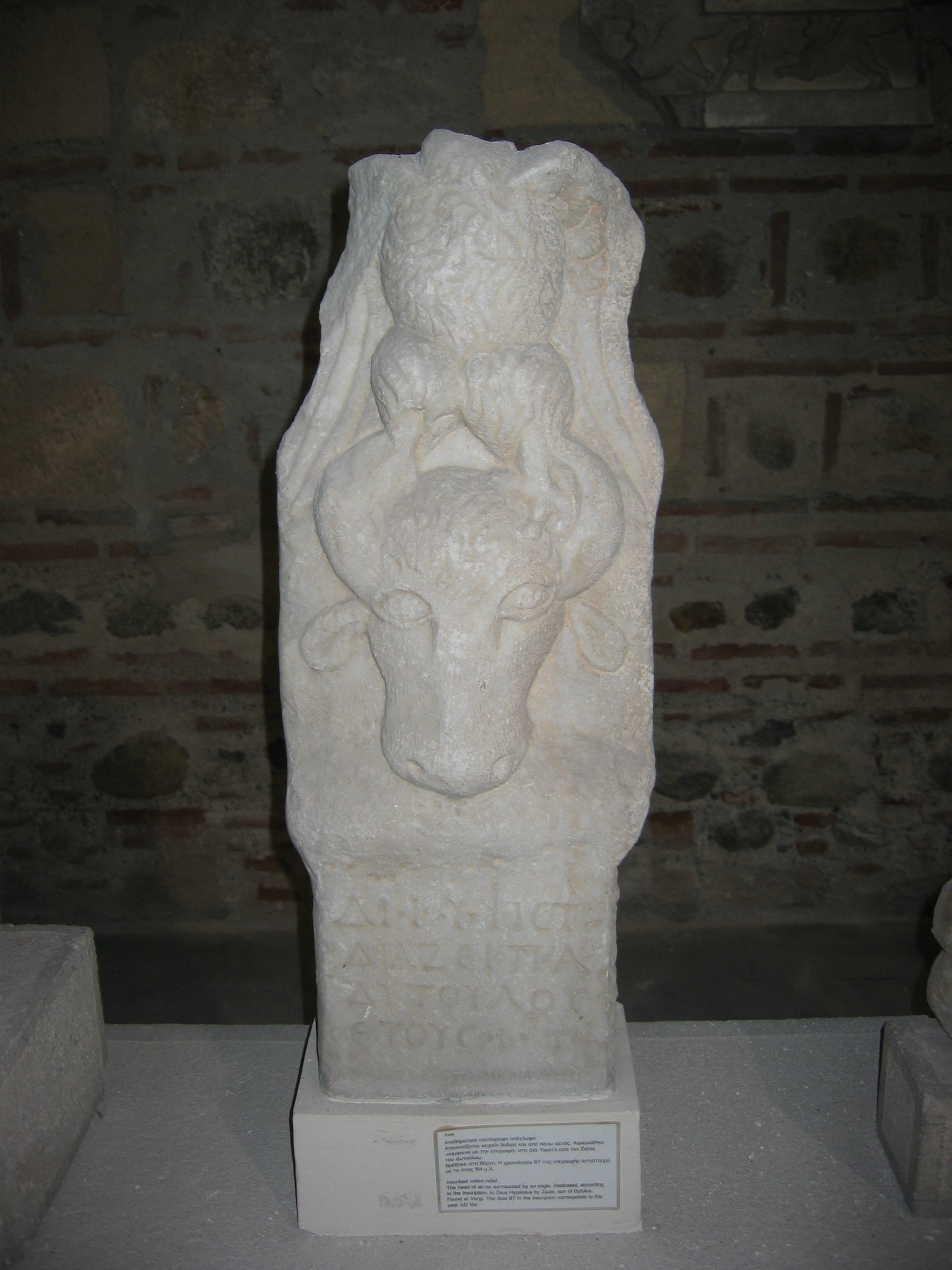 Musée archéologique de Serrès, Grèce